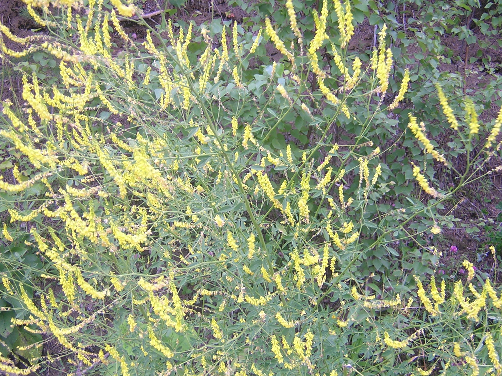 Донник лекарственный. Цветение. Савинский район Ивановской области. Россия.